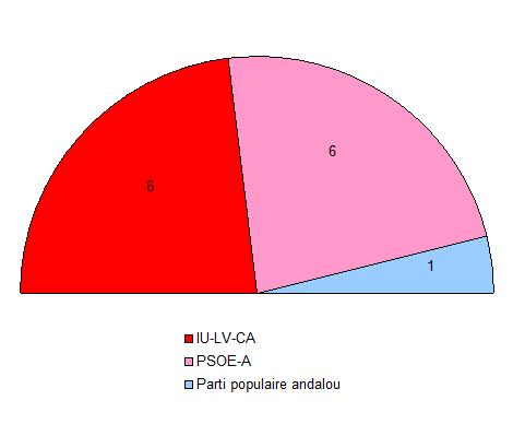 Composition du conseil municial d'Archidona (Espagne), pour la mandature 2007-2011.